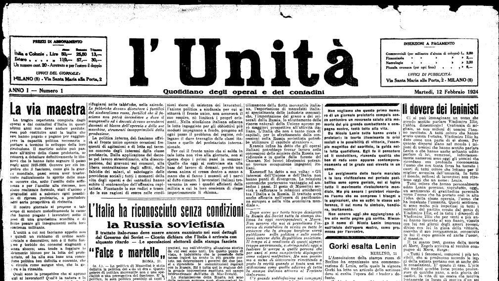 La prima pagina de L'Unità (quotidiano fondato da Antonio Gramsci nel 1924) Licensing Template:Progetto:Coordinamento/Immagini/Bot/Template duplicati